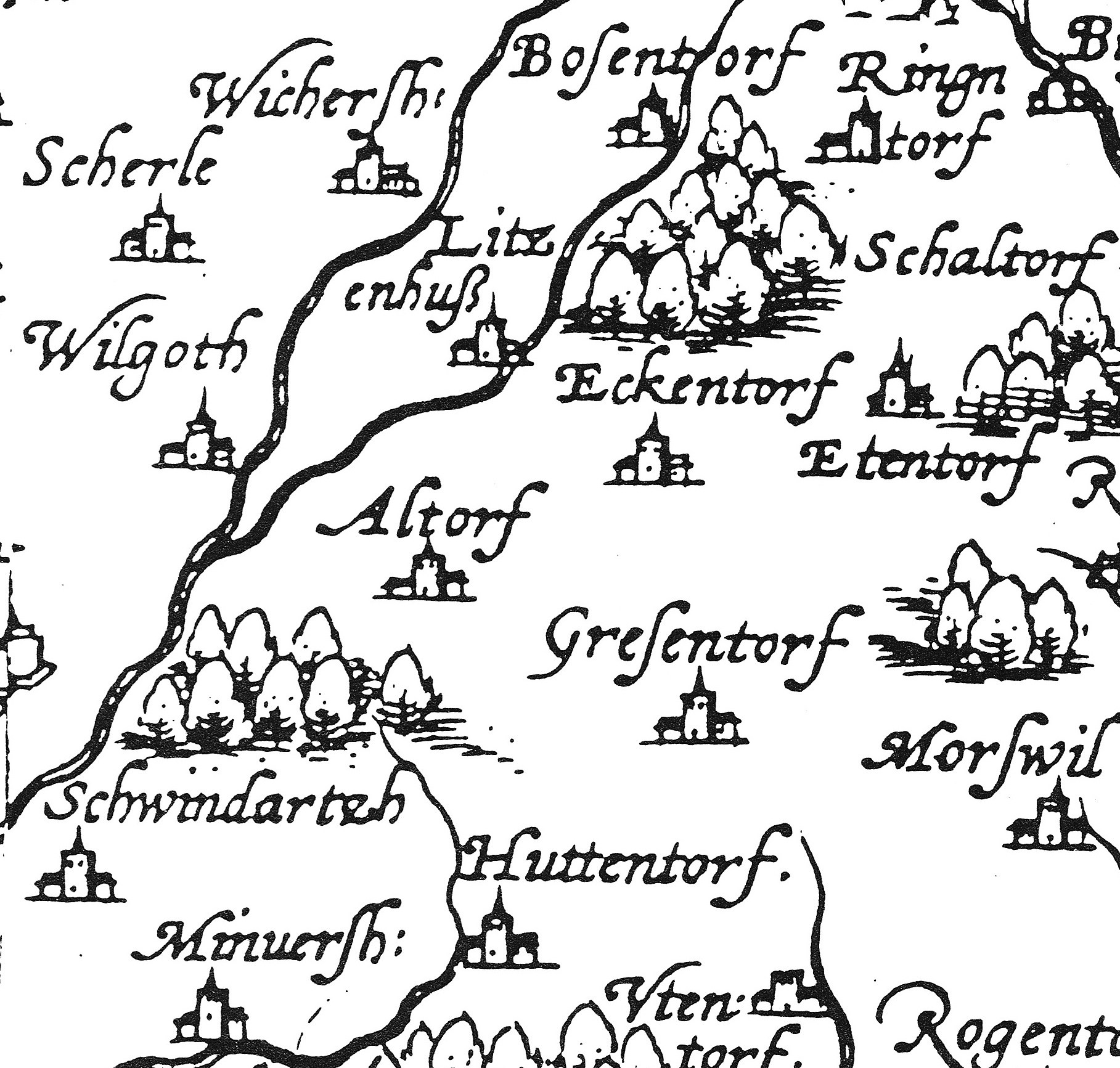 Carte de l'Alsace établie par Daniel Specklin au XVIe siècle et centrée ici sur Alteckendorf.